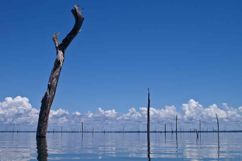 Brokopondo Lake Suriname